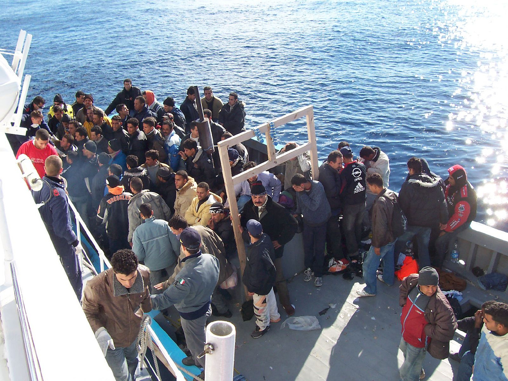 Ringrazio per la foto Matteo Penna.